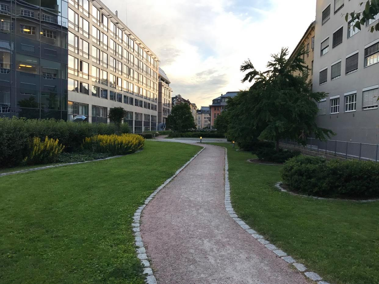 Sommerfrydparken sett fra øst.